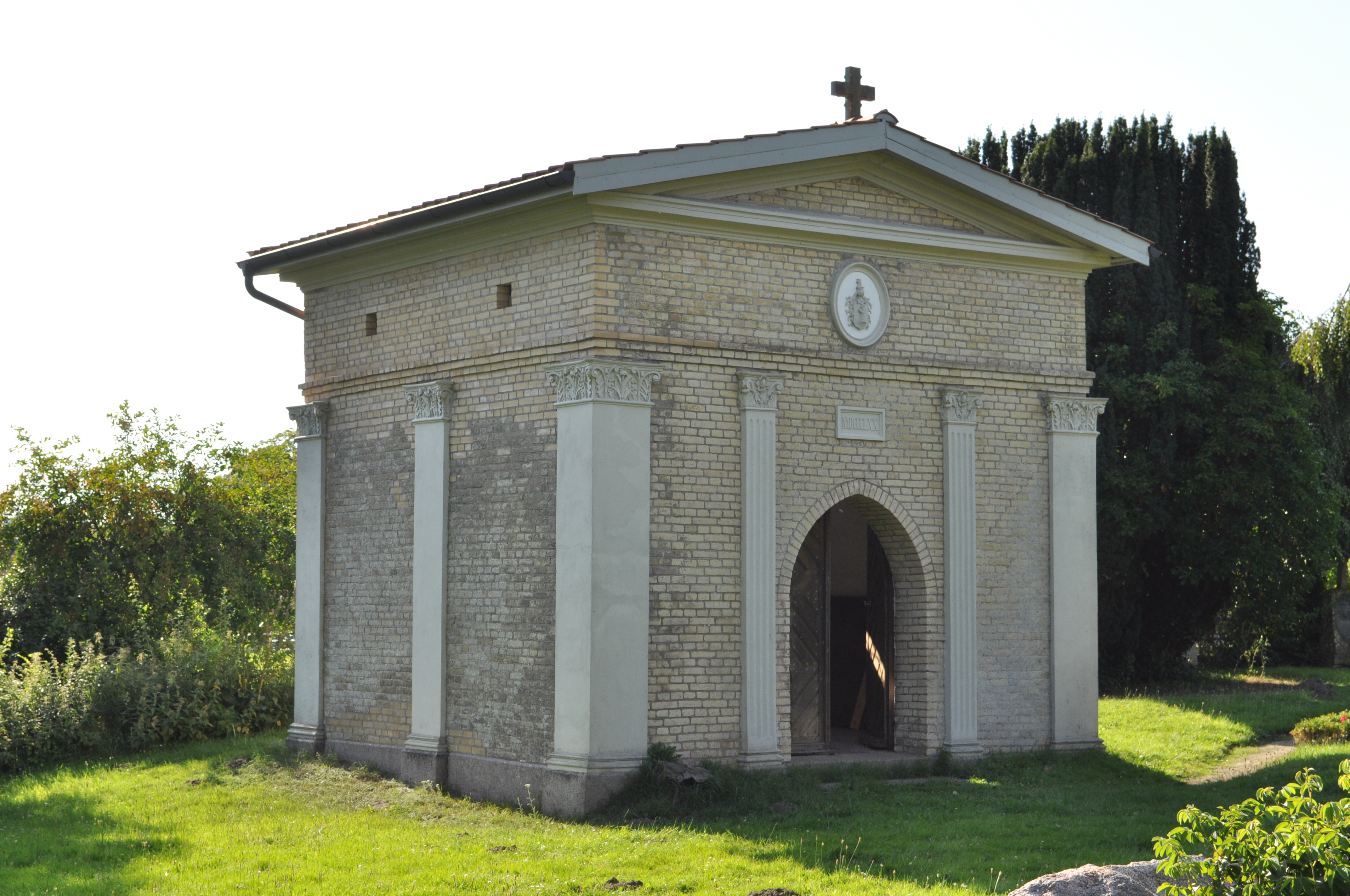 Mausoleum auf dem Friedhof in Pronstorf. This is a photograph of an architectural monument. .5